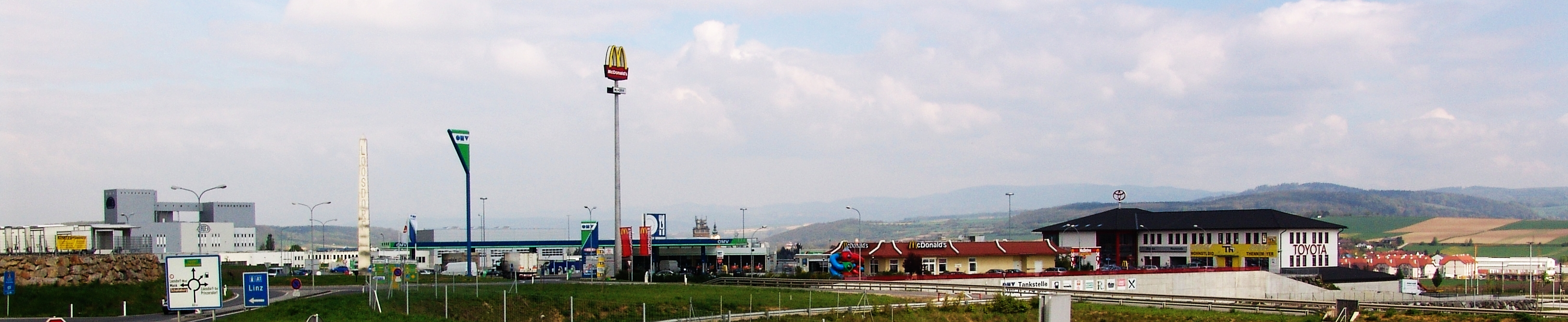 Gewerbegebiet Loosdorf von der Autobahnabfahrt